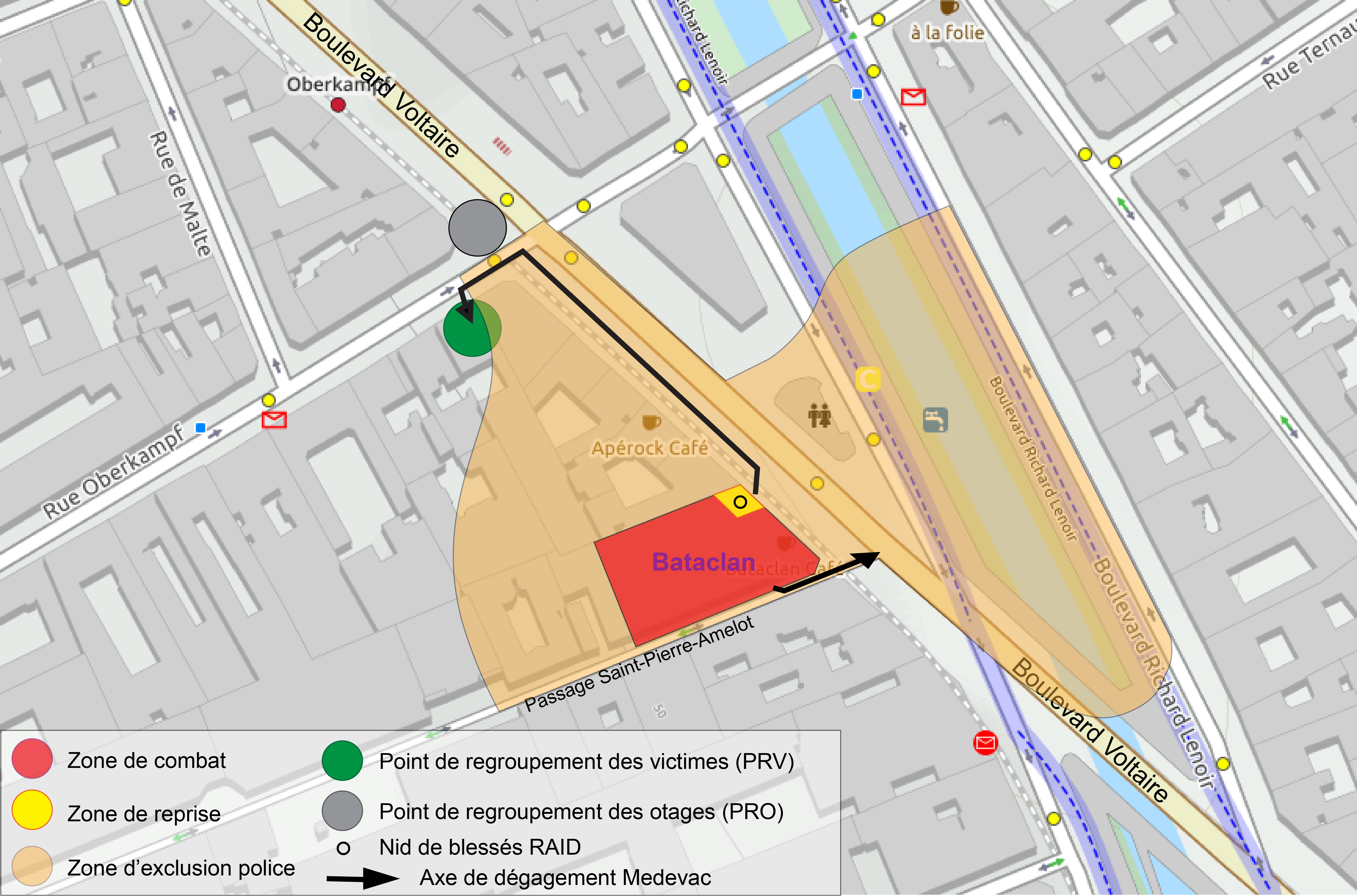 Zonage mis en place selon la doctrine médicale d’intervention du RAID lors des attentats du 13 novembre 2015.